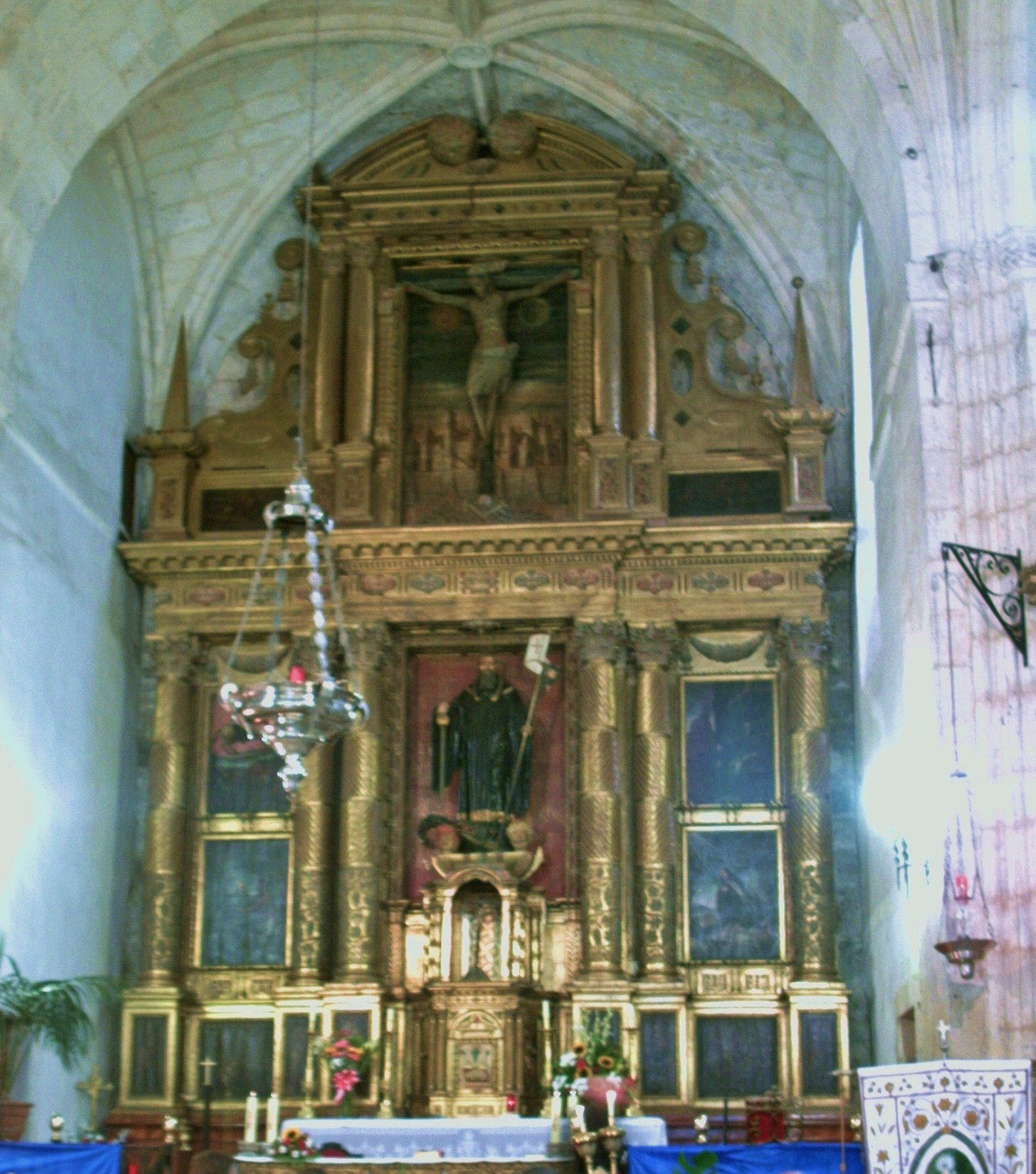 Iglesia de San Millán. Altar Mayor.